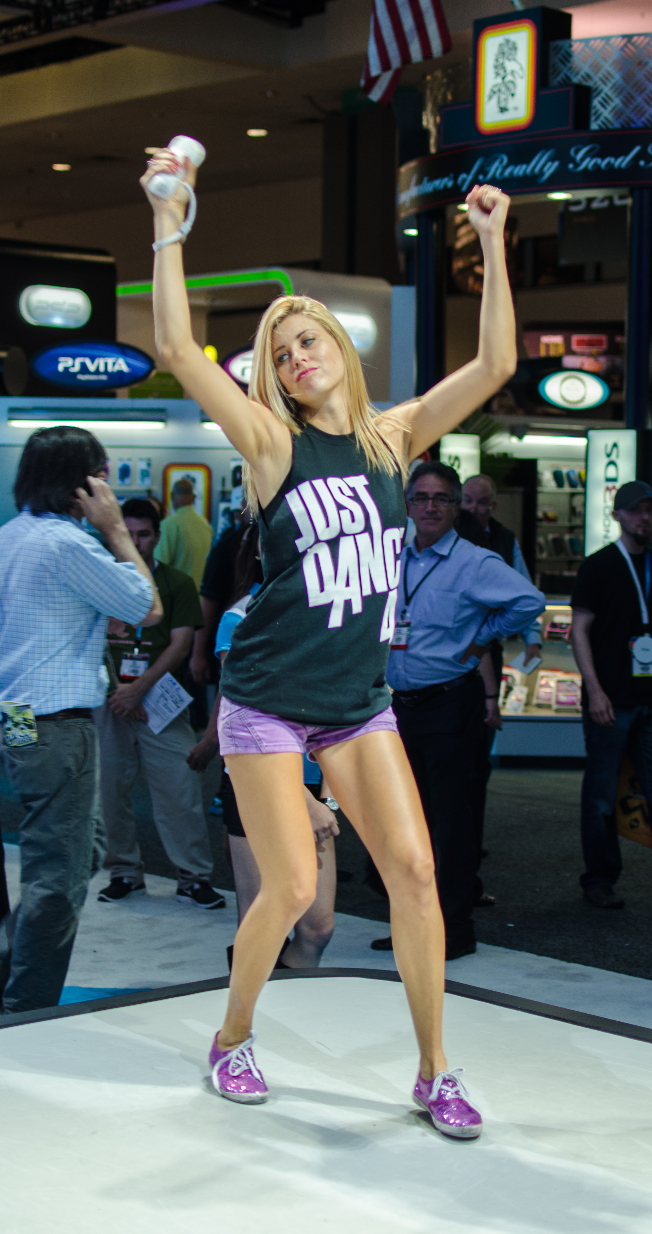 Dancing girl at E3 2012